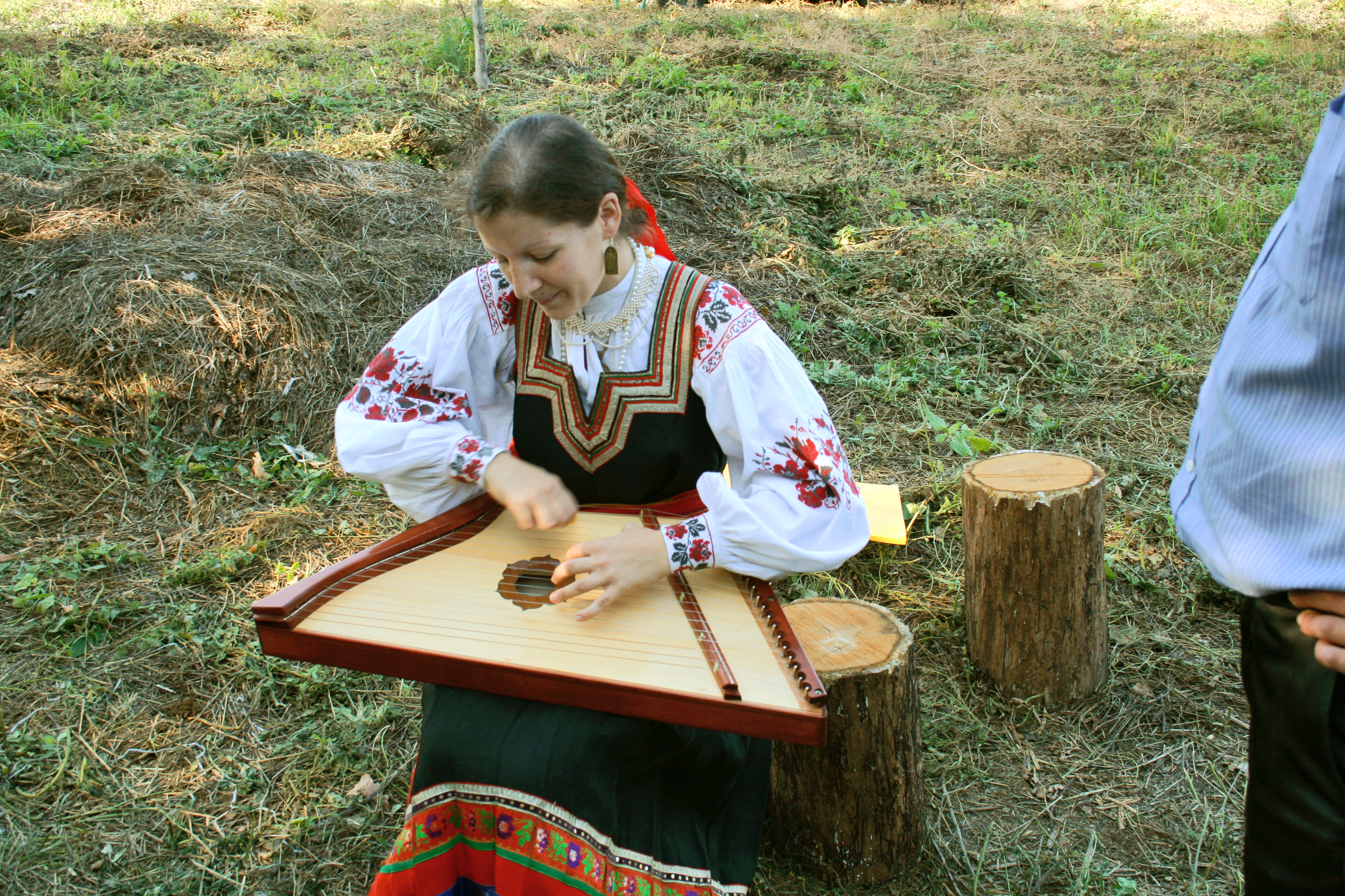 Музей народной культуры Белгородской области в гостях у родового экопоселения «Кореньские родники». Белгородская область.